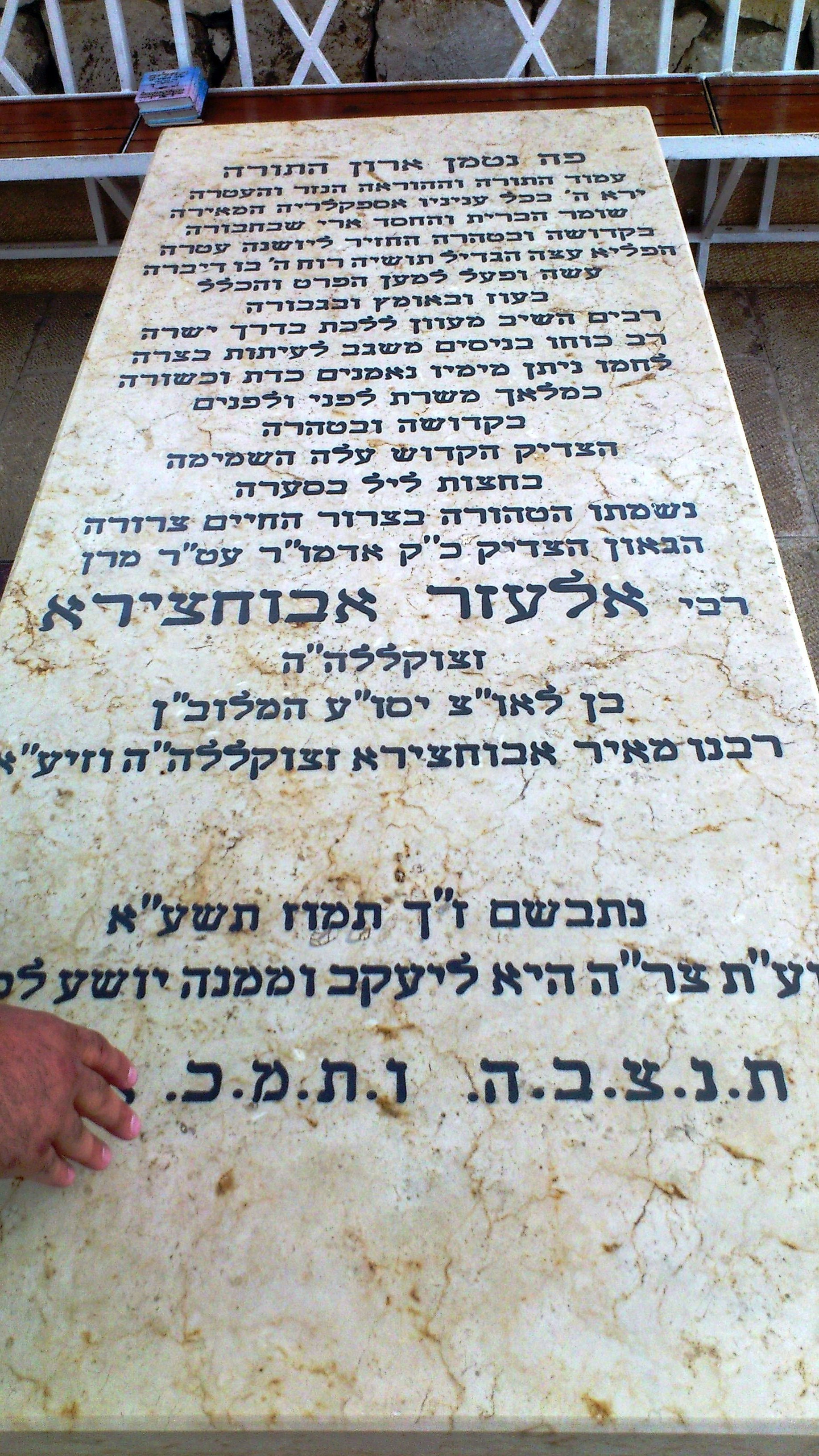 קבר רבי אלעזר אבוחצירא